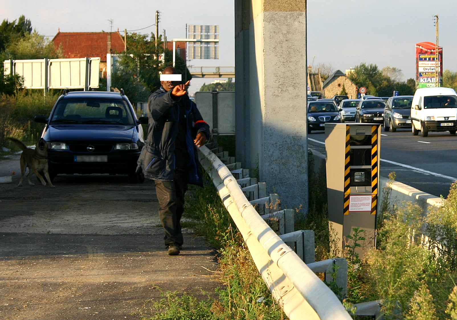 Scoop pour Wikipédia : le nouveau radar de troisième génération installé à La Ville-du-Bois (Essonne) est surveillé 24 heures sur 24 par un vigile interdisant l'accès à la zone et empêchant (!) les photographies. Je suis arrivé lors de la relève (19 heures). J'avais déjà noté le véhicule qui était stationné derrière la pile de pont depuis l'installation de cette nouvelle cabine le 20 septembre 2006.